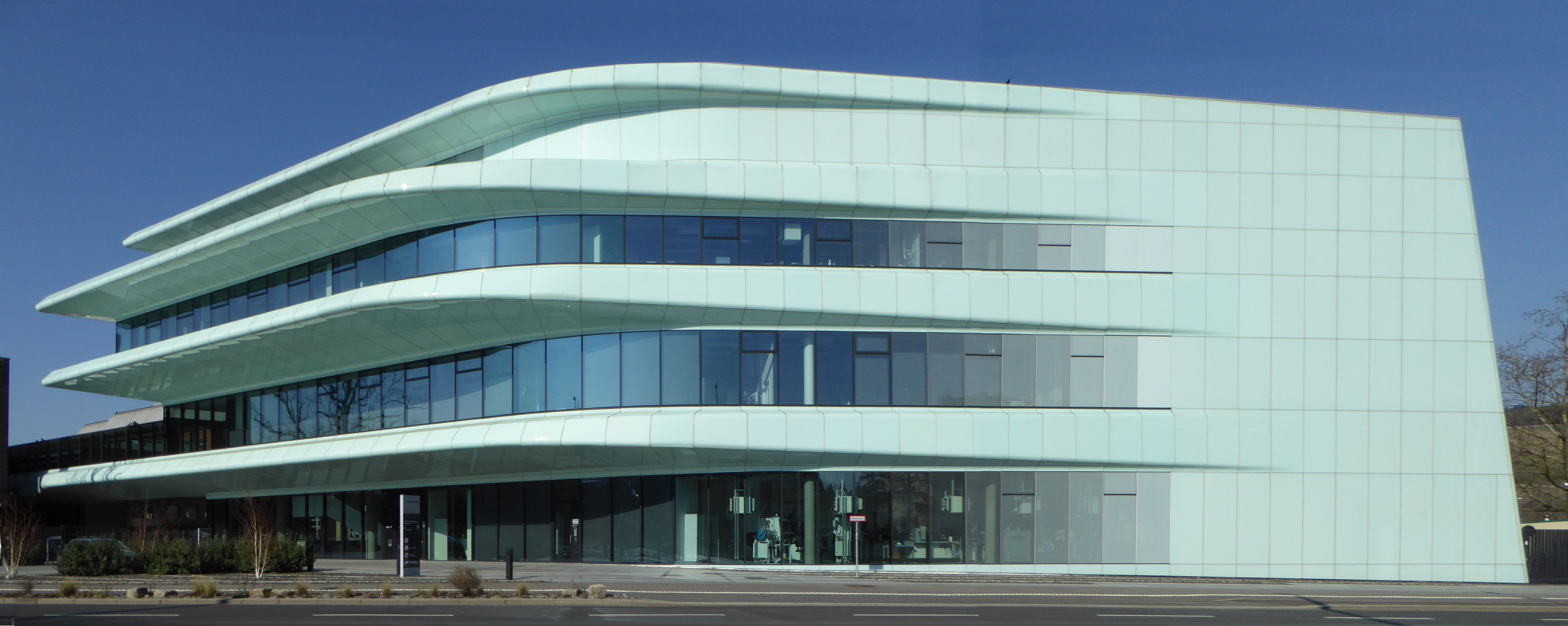 Der Technikumsneubau des Fraunhofer-Instituts für Silikatforschung am Neunerplatz in Würzburg.